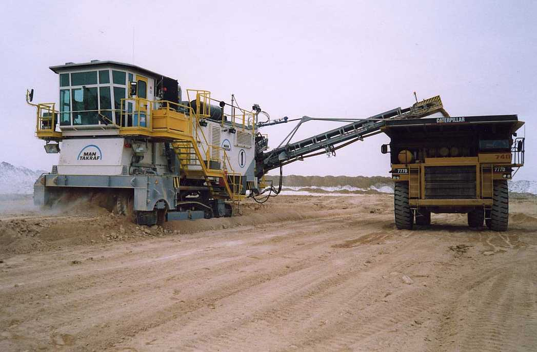 CSM mit Abwurfausleger beim Beladen eines Trucks